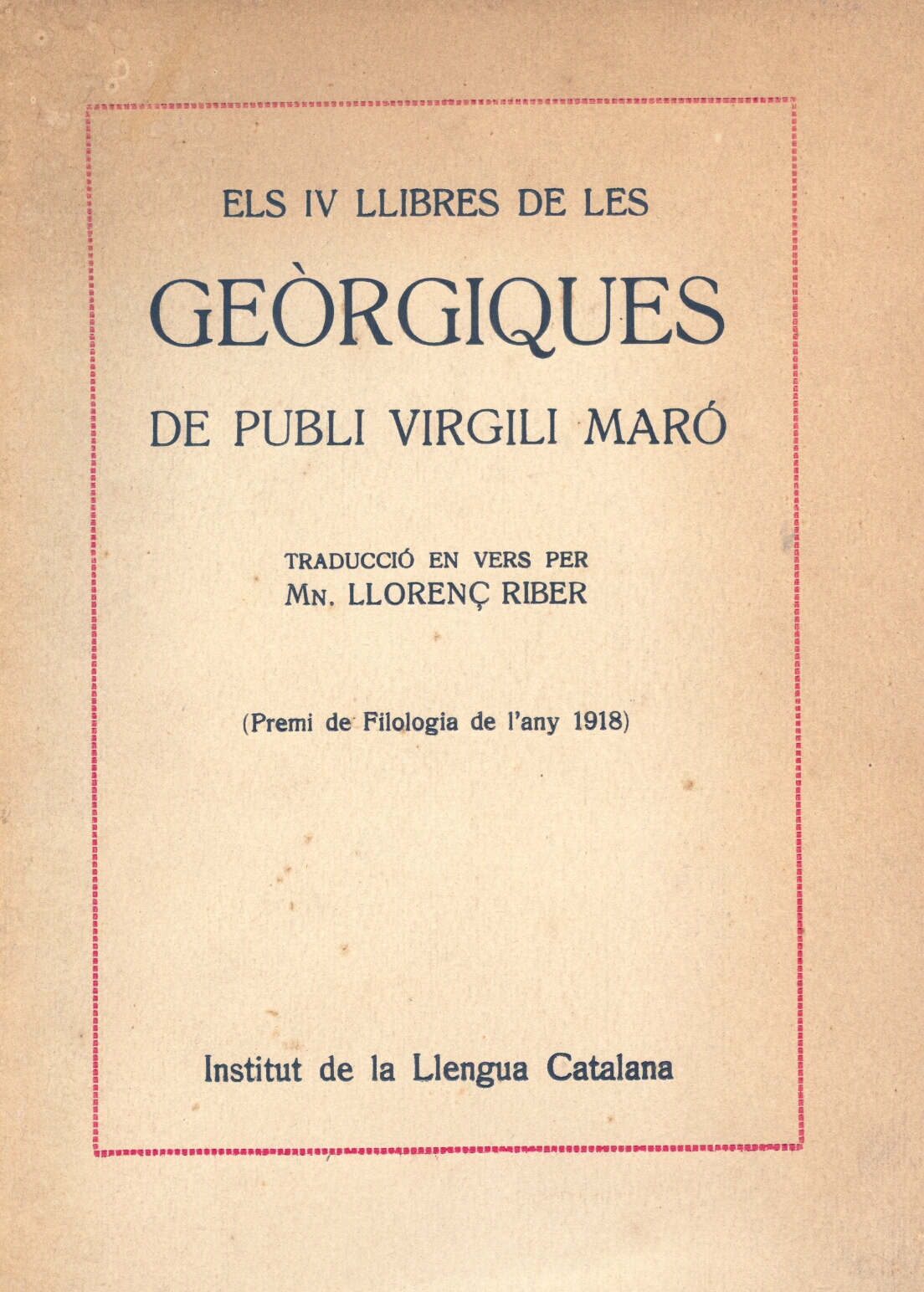 Portada de les Geòrgiques, de Virgili. Edició de 1918. Institut de la Llengua Catalana